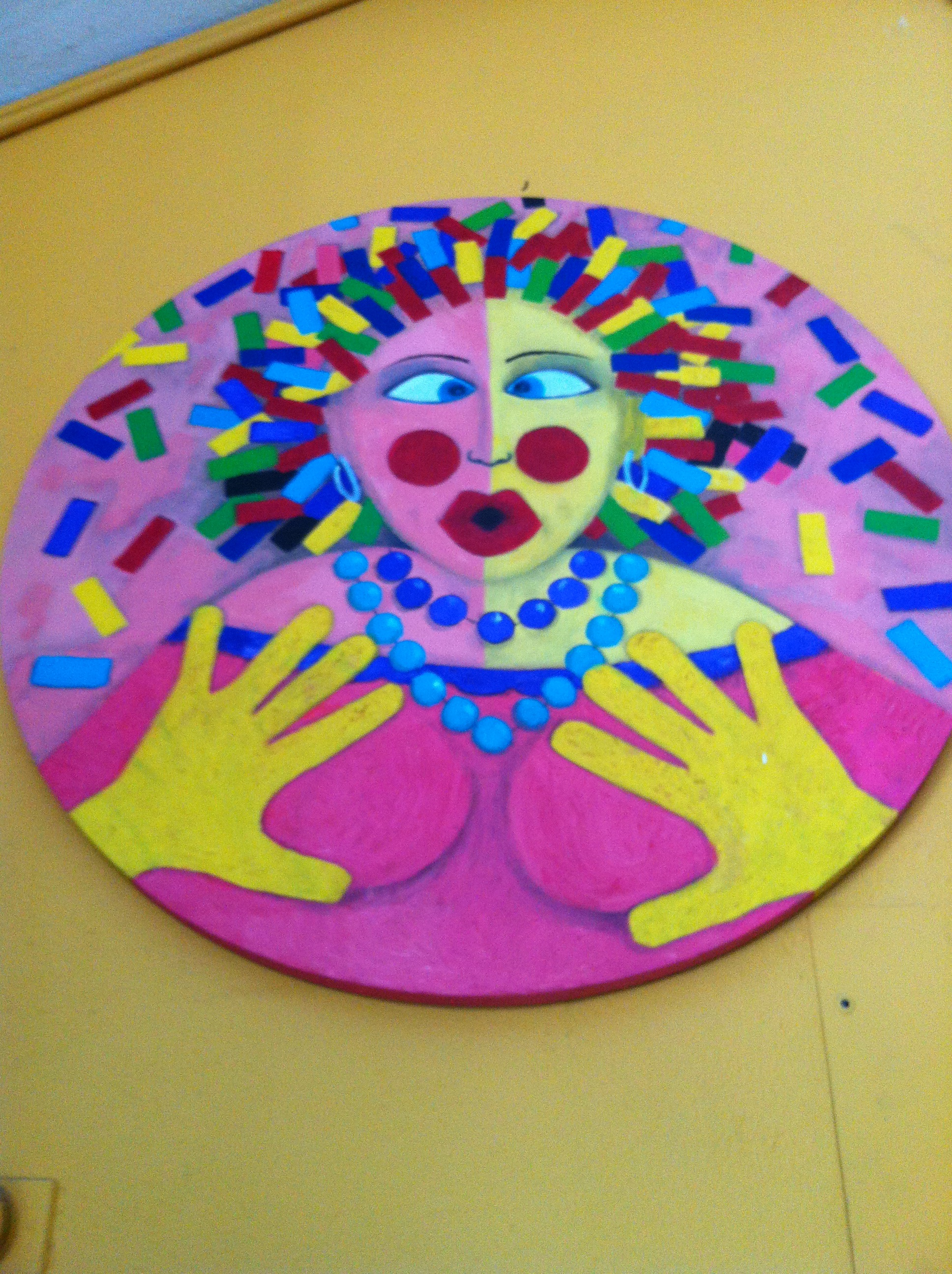 María Moñitos - Carnaval de Barranquilla